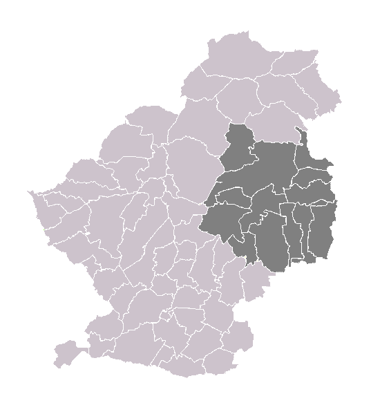 Canton de Marchiennes dans son arrondissement